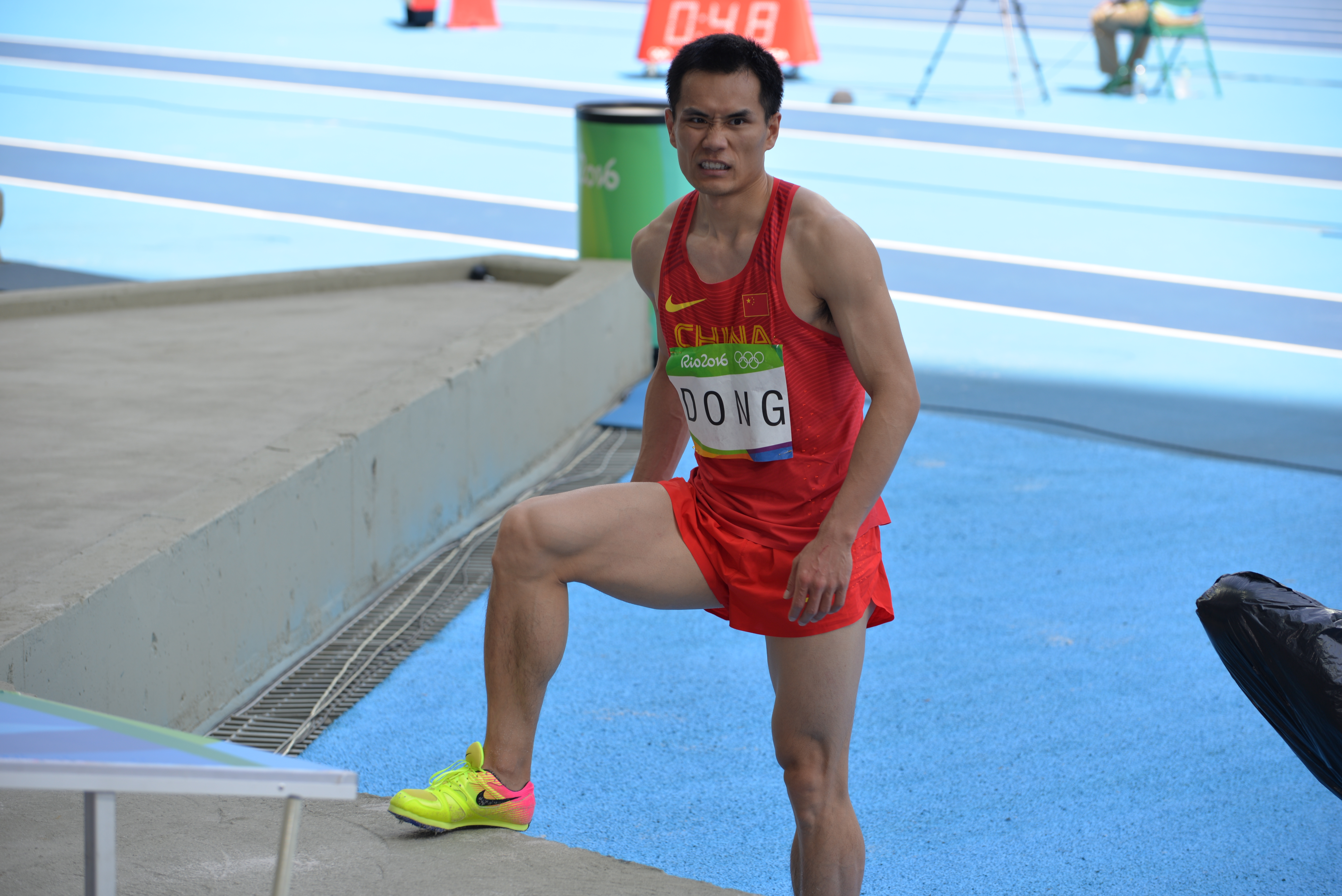 Finale du concours du triple saut à Rio 2016